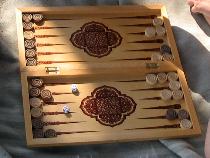 Нарды.